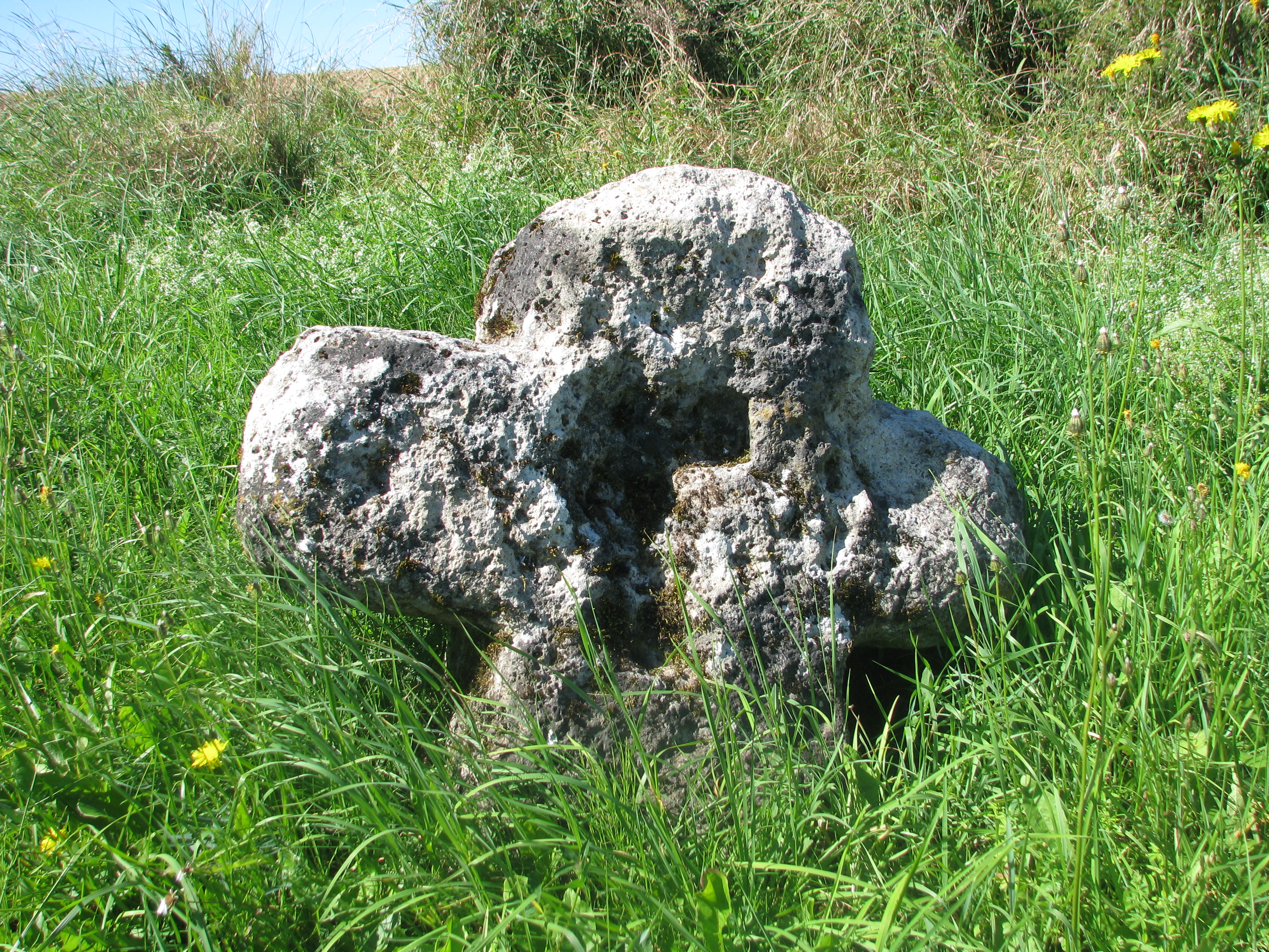 Steinkreuz bei der Schallermühle, Ortsteil von Velburg im Landkreis Neumarkt i. d. Opf.